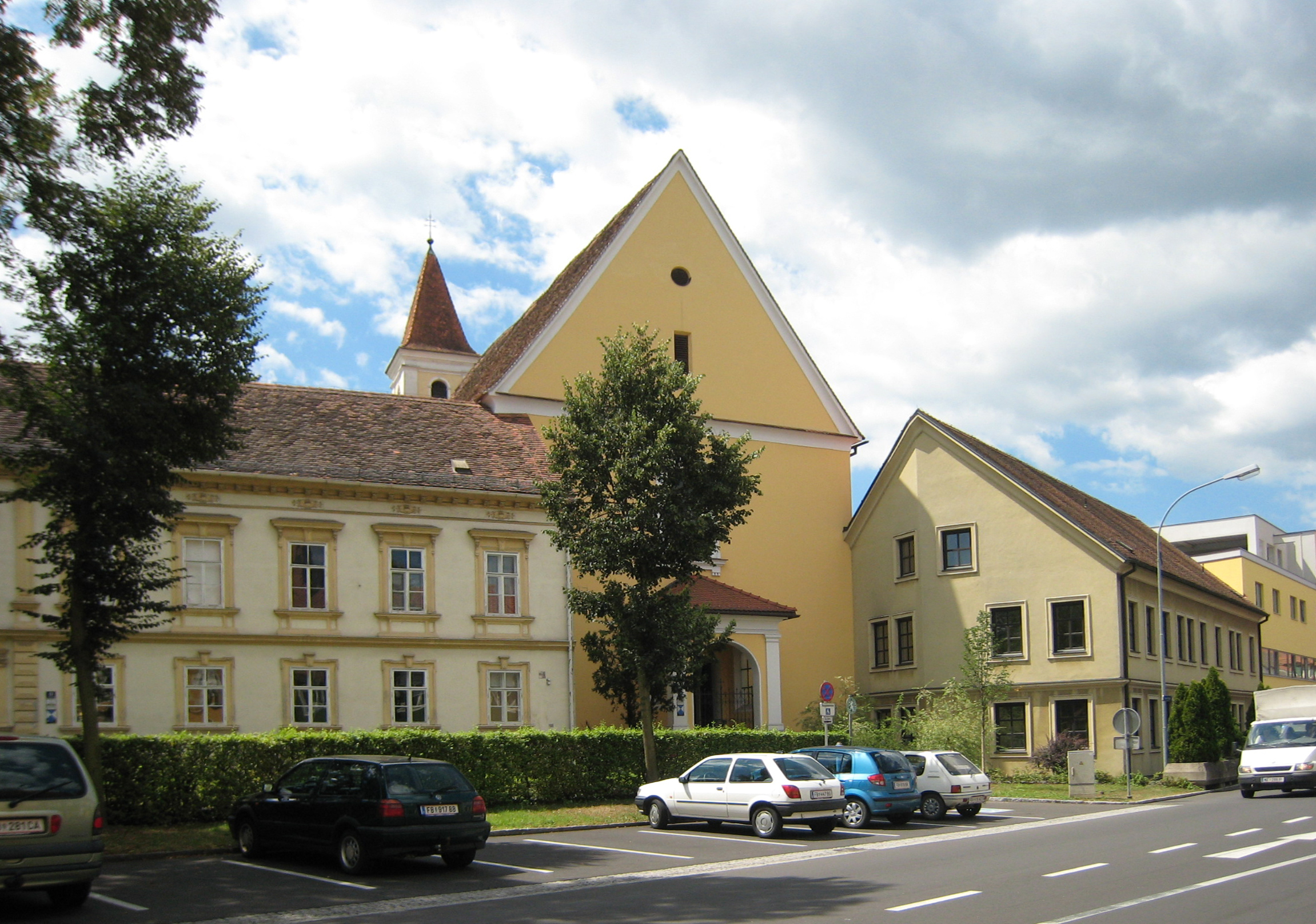 Schule, ehem. Franziskanerkloster in Feldbach